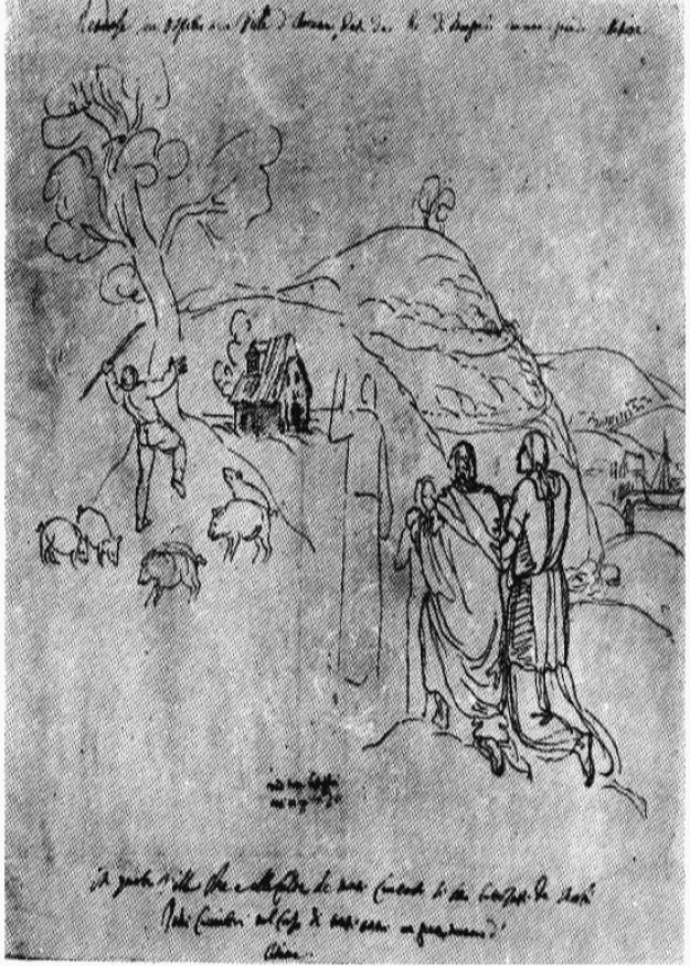 სოფელ ასკანის ხედი, კასტელის ნახატი